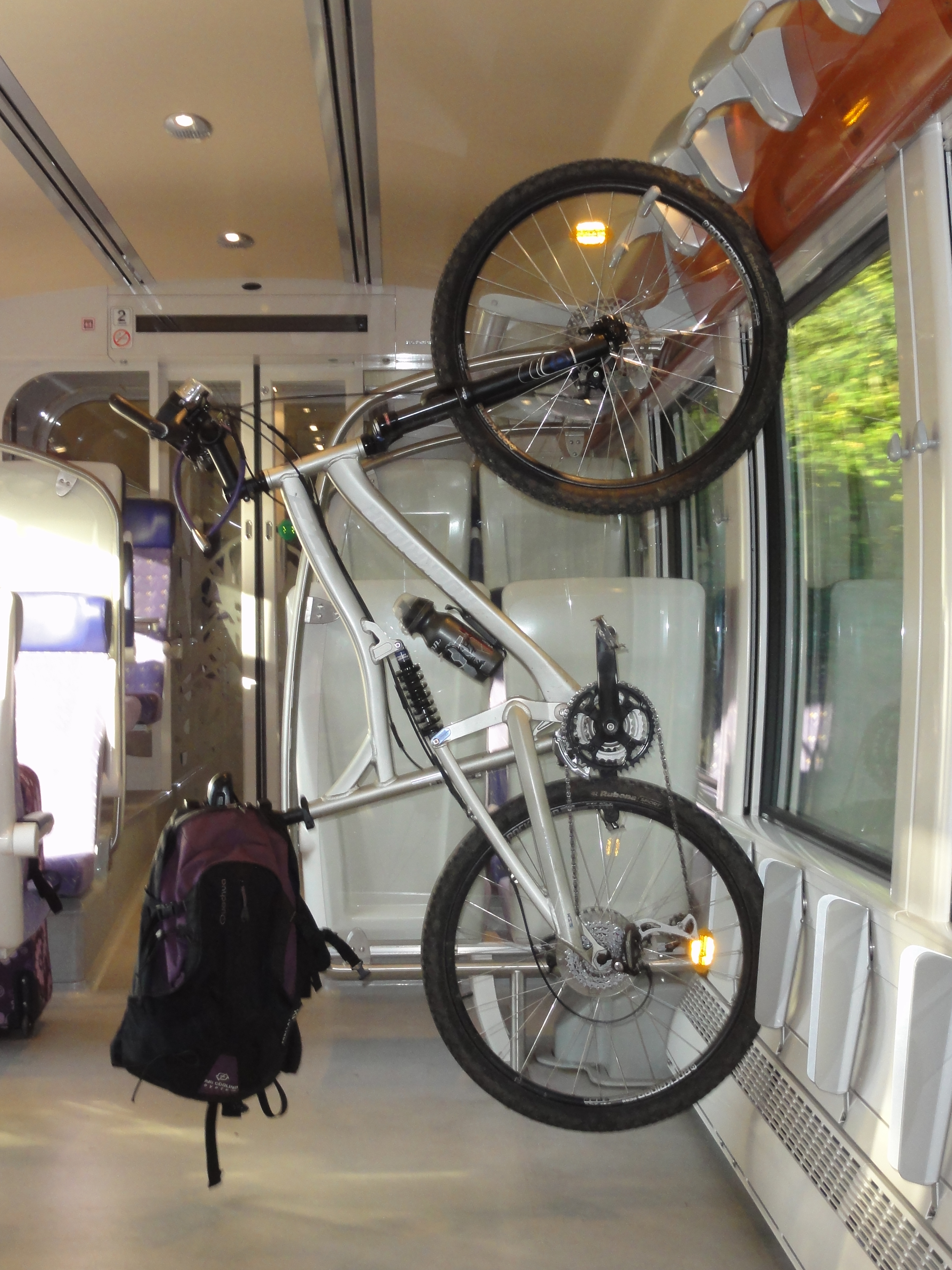 TER Nord-Pas-de-Calais, transport des vélos dans les trains. C'est avec ce VTT que je parcours le bassin minier depuis 2011, sans jamais utiliser la voiture, et en empruntant toujours le train et le vélo.